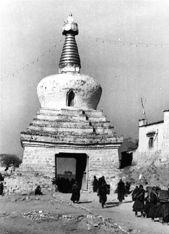 Lhasa, Einzug der Lamas zum Mönlon